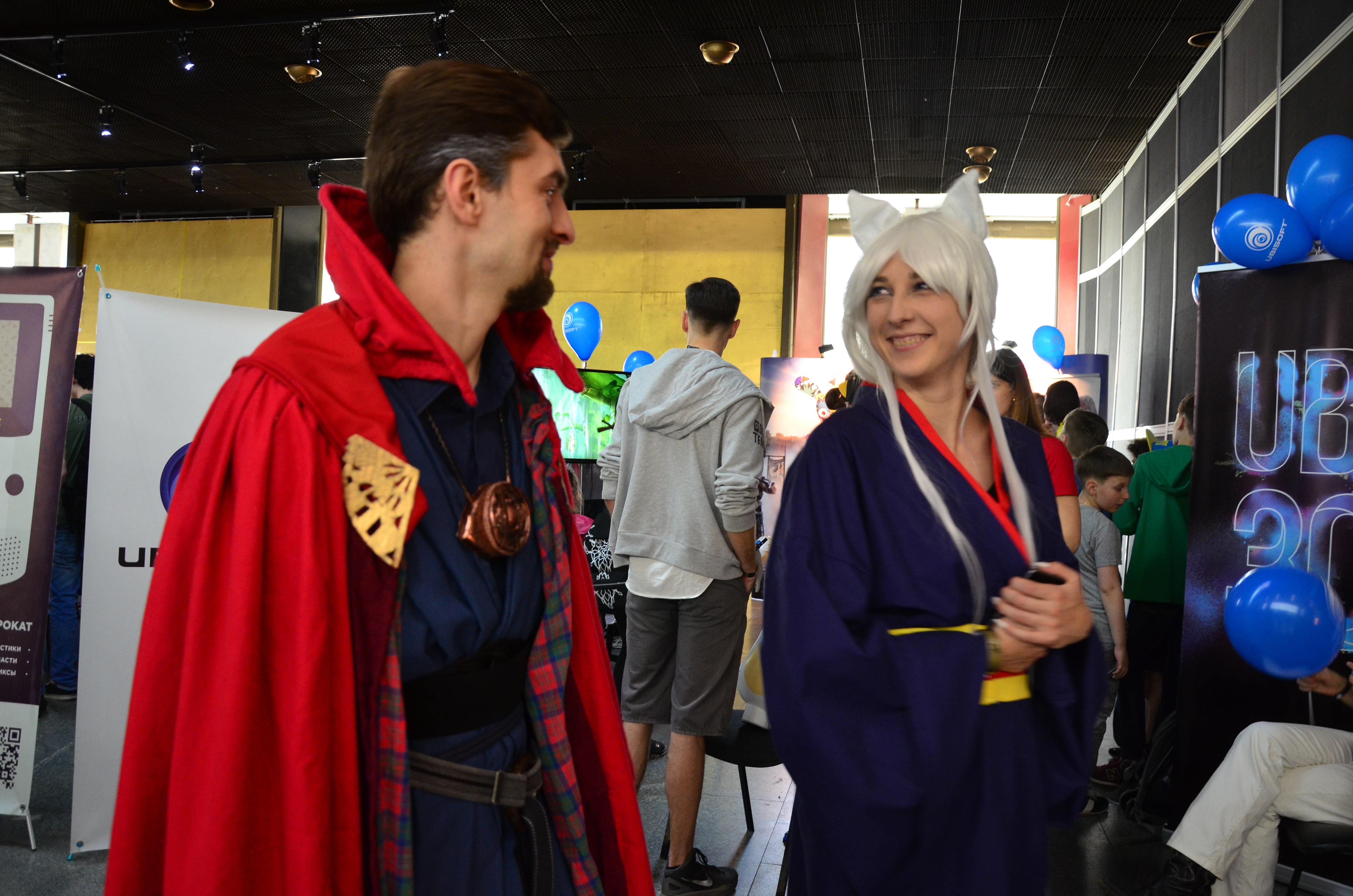 6 та 7 травня в Українському Домі по вулиці Хрещатик, 2 у Києві відбувся фестиваль Comic Con.